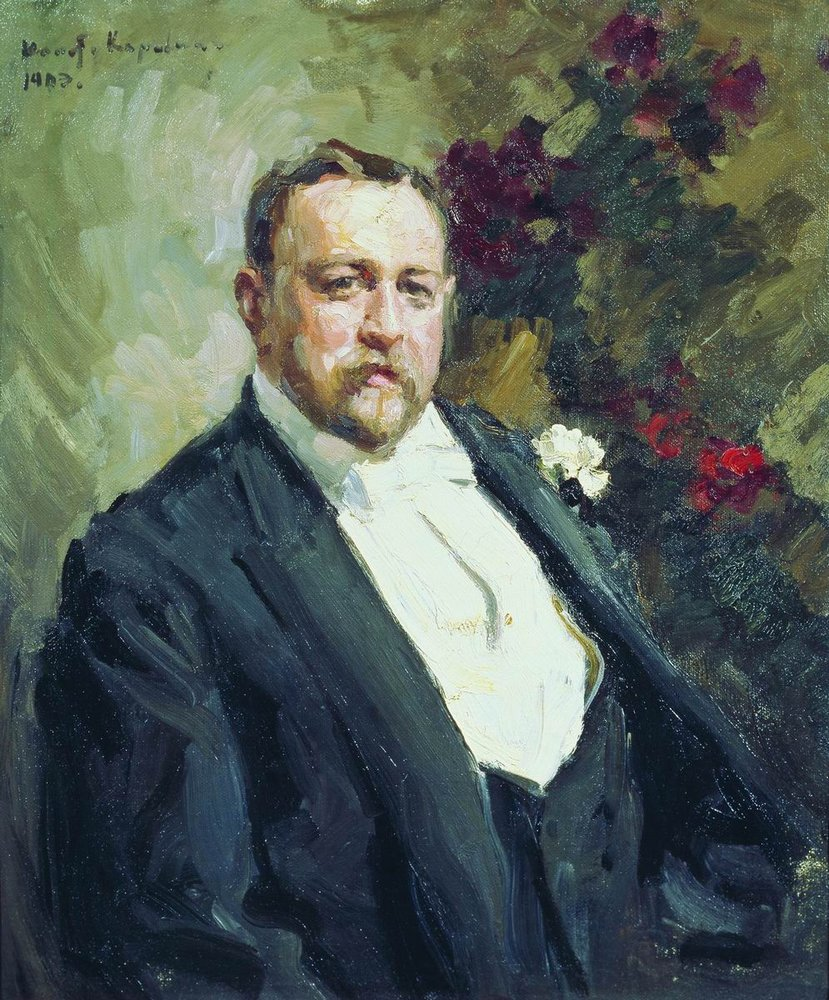 Портрет И.А.Морозова. 1903